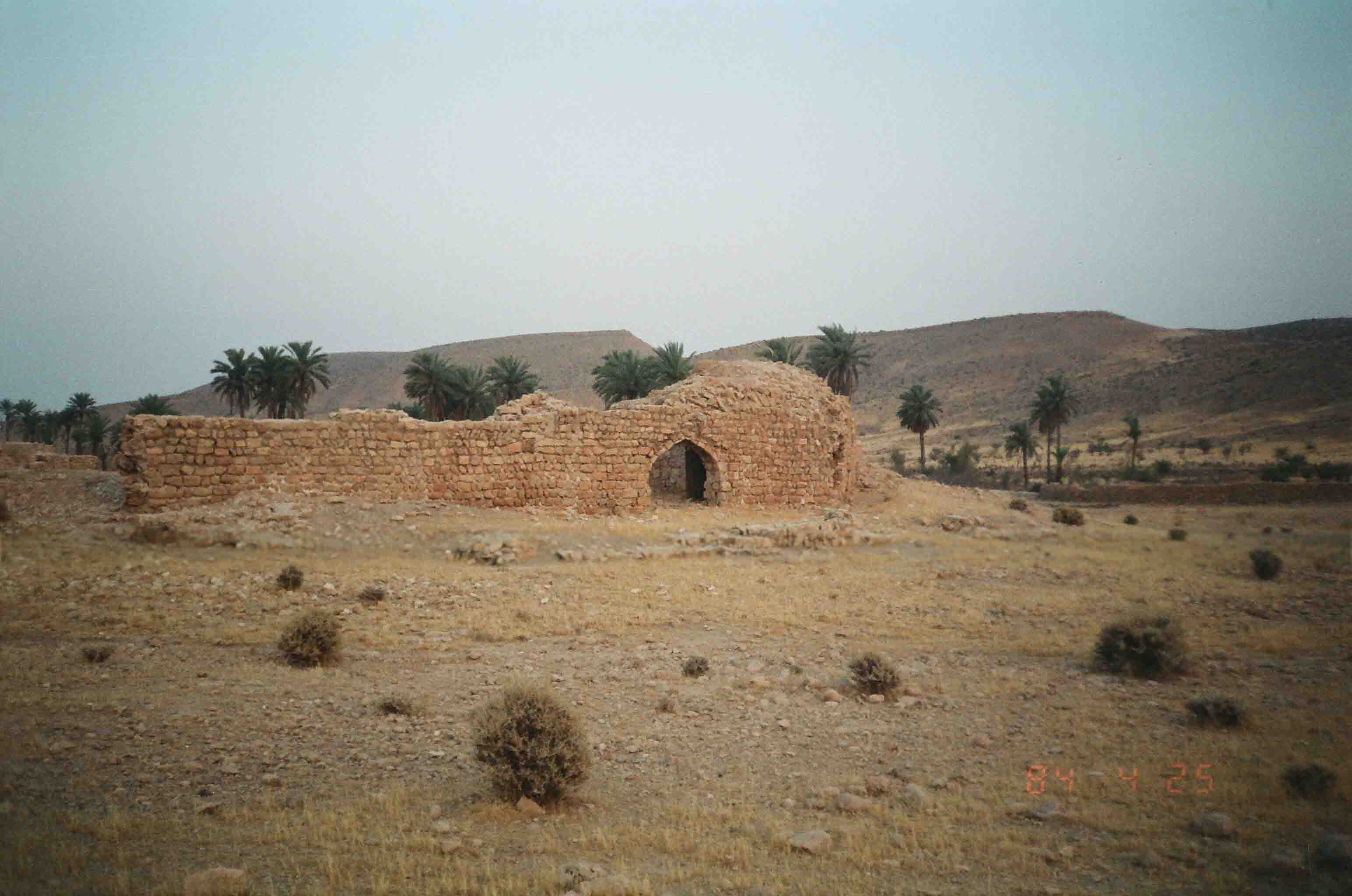 کاروانسراي موزر